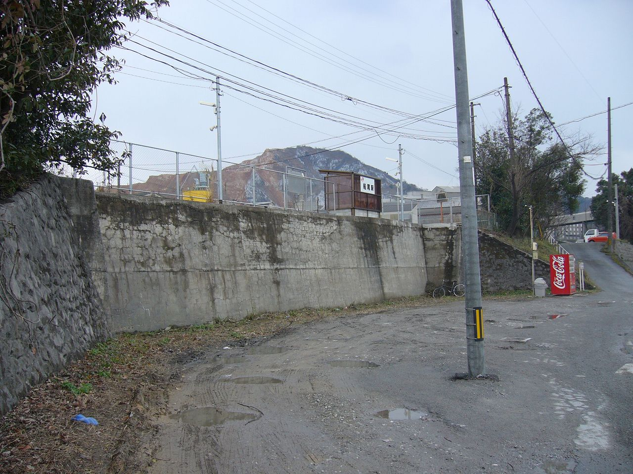 船尾駅 投稿者撮影